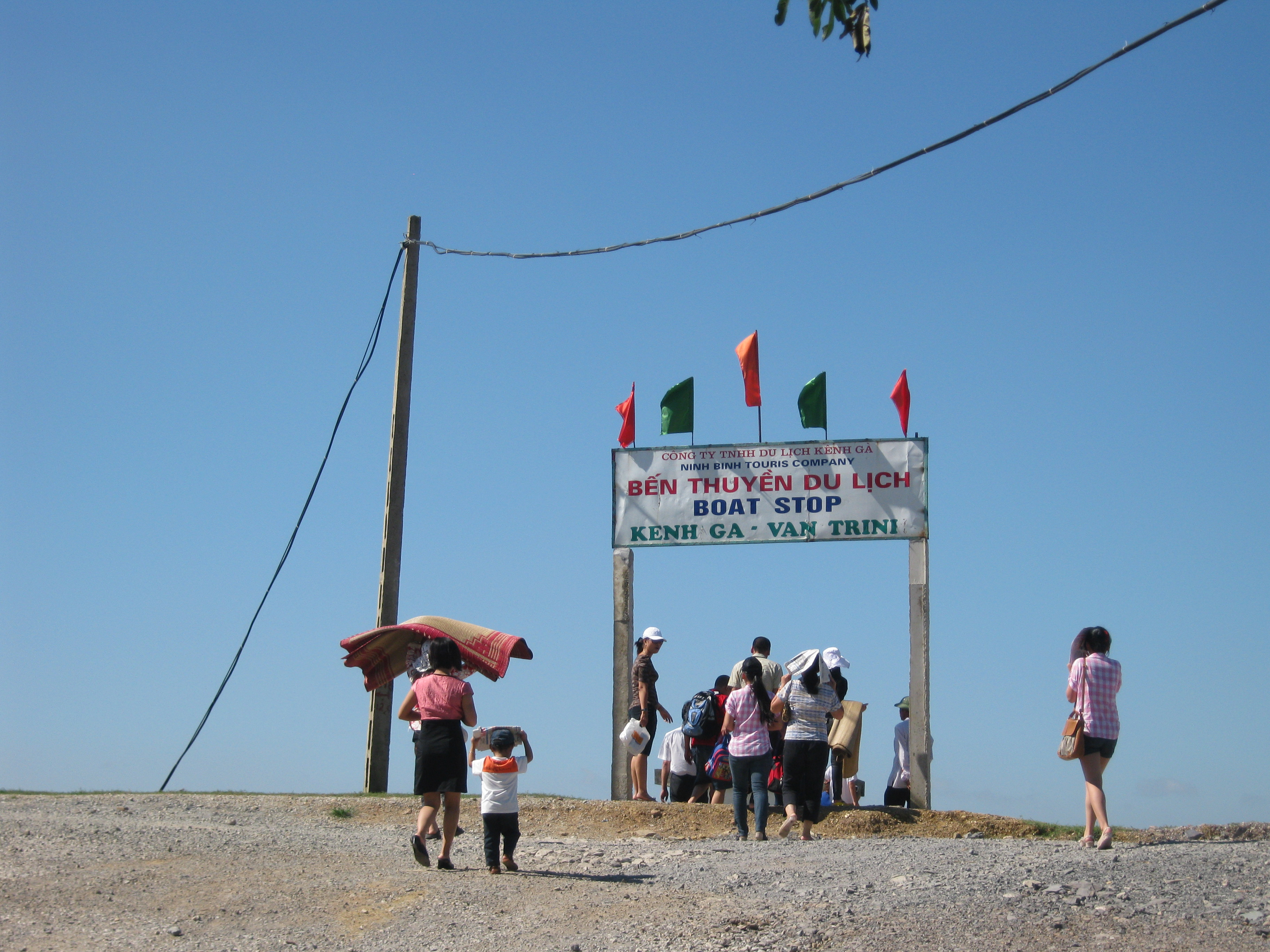 Bến thuyền du lịch Kênh Gà - Vân Trình, Gia Viễn